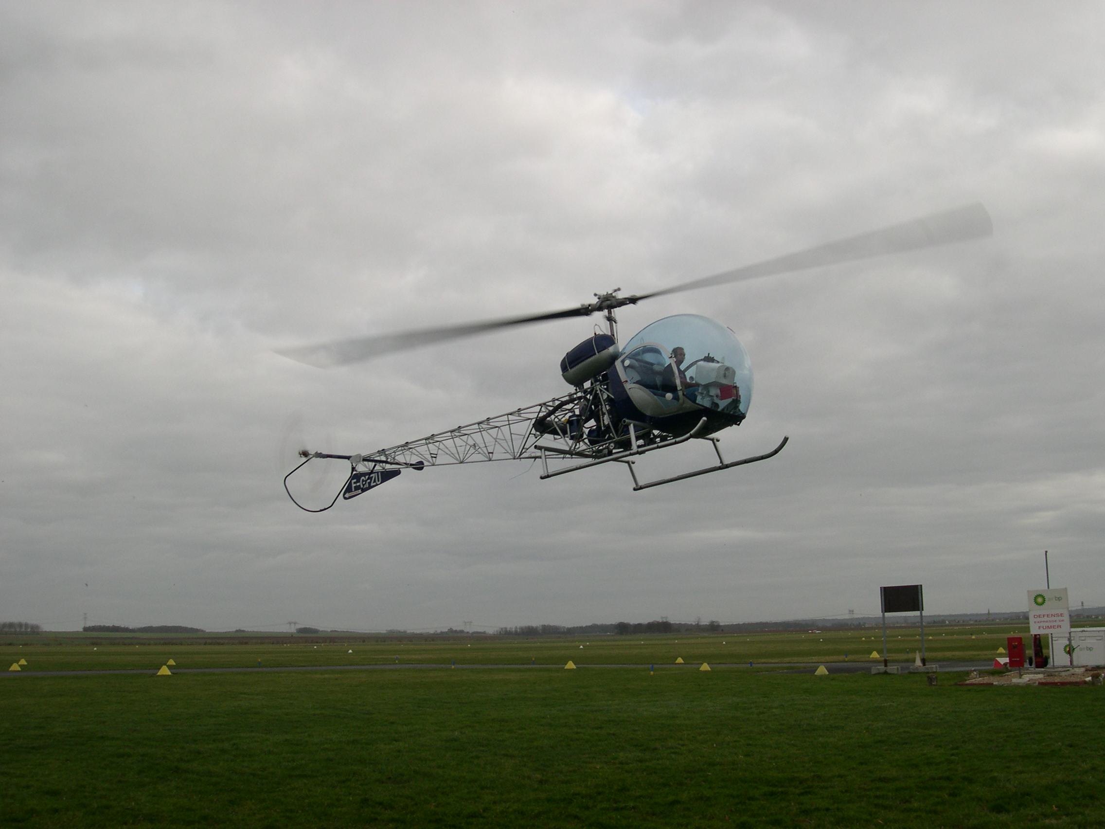 L'hélicoptère Bell 47 est vu ici lors de son atterrissage sur l'aérodrome francilien de Persan-Beaumont.